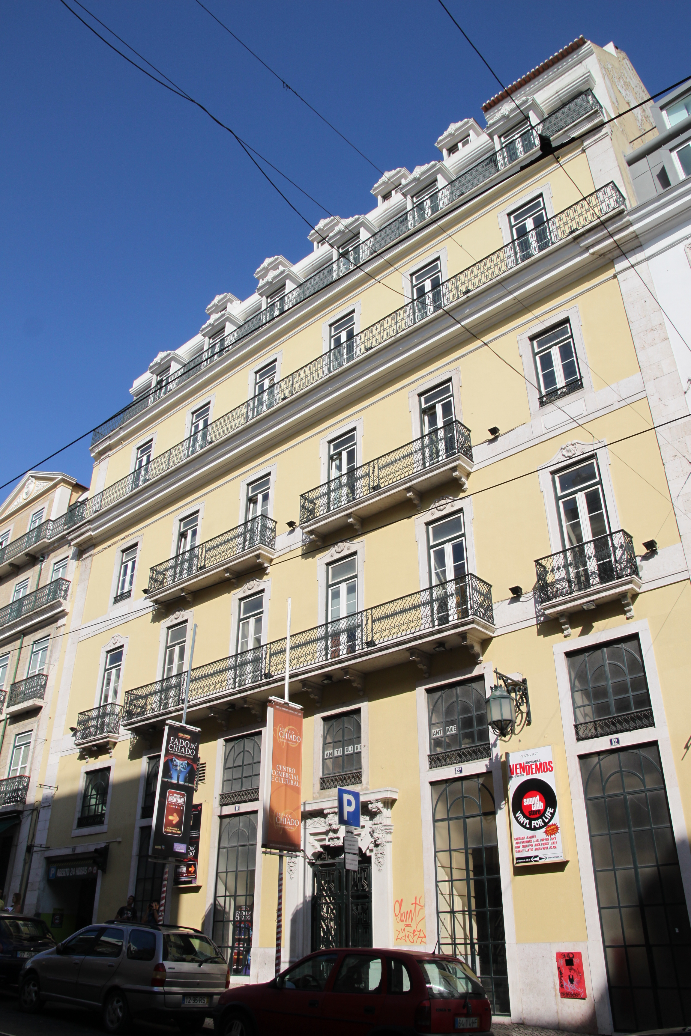 Teatro Ginásio (fachada) This file was uploaded for Wiki Loves Monuments in Portugal with the unique identifier 74473.